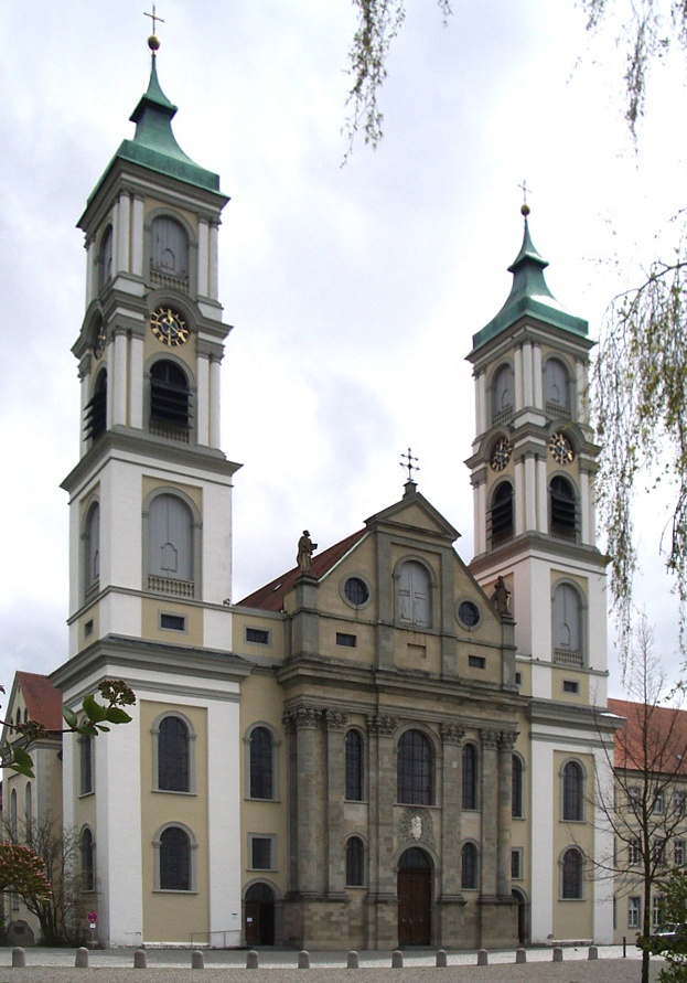 Ravensburg, Kloster Weißenau: ehemalige Klosterkirche